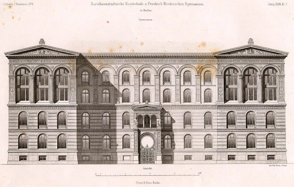 Dorotheenstädtische Realschule u. Friedrich Werdersches Gymnasium, Berlin, Ansicht der Realschule. Das Gebäude wurde nach einem Gesamtkonzept des Stadtinspektors Hanel unter der Leitung von Hermann Blankenstein von 1871-1875 errichtet